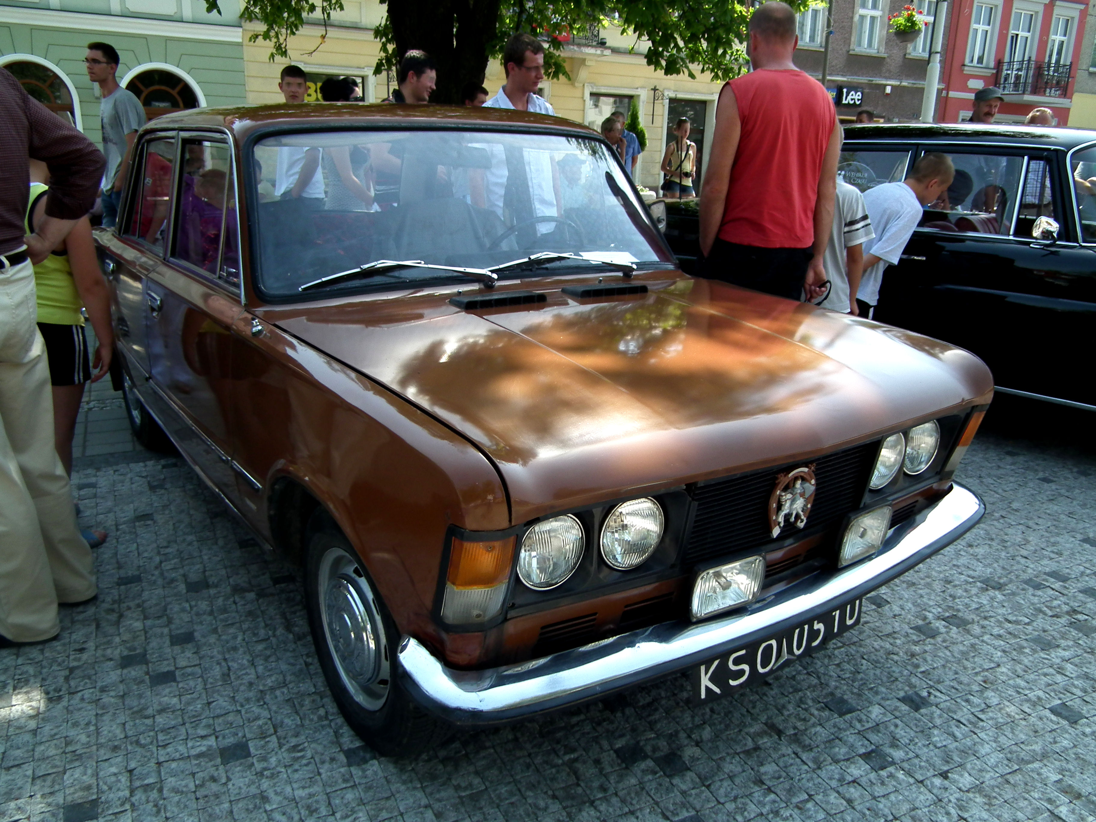 Polski Fiat 125p 1300 MR75 z 1976 roku podczas II Zlotu pojazdów zabytkowych w Jaśle.